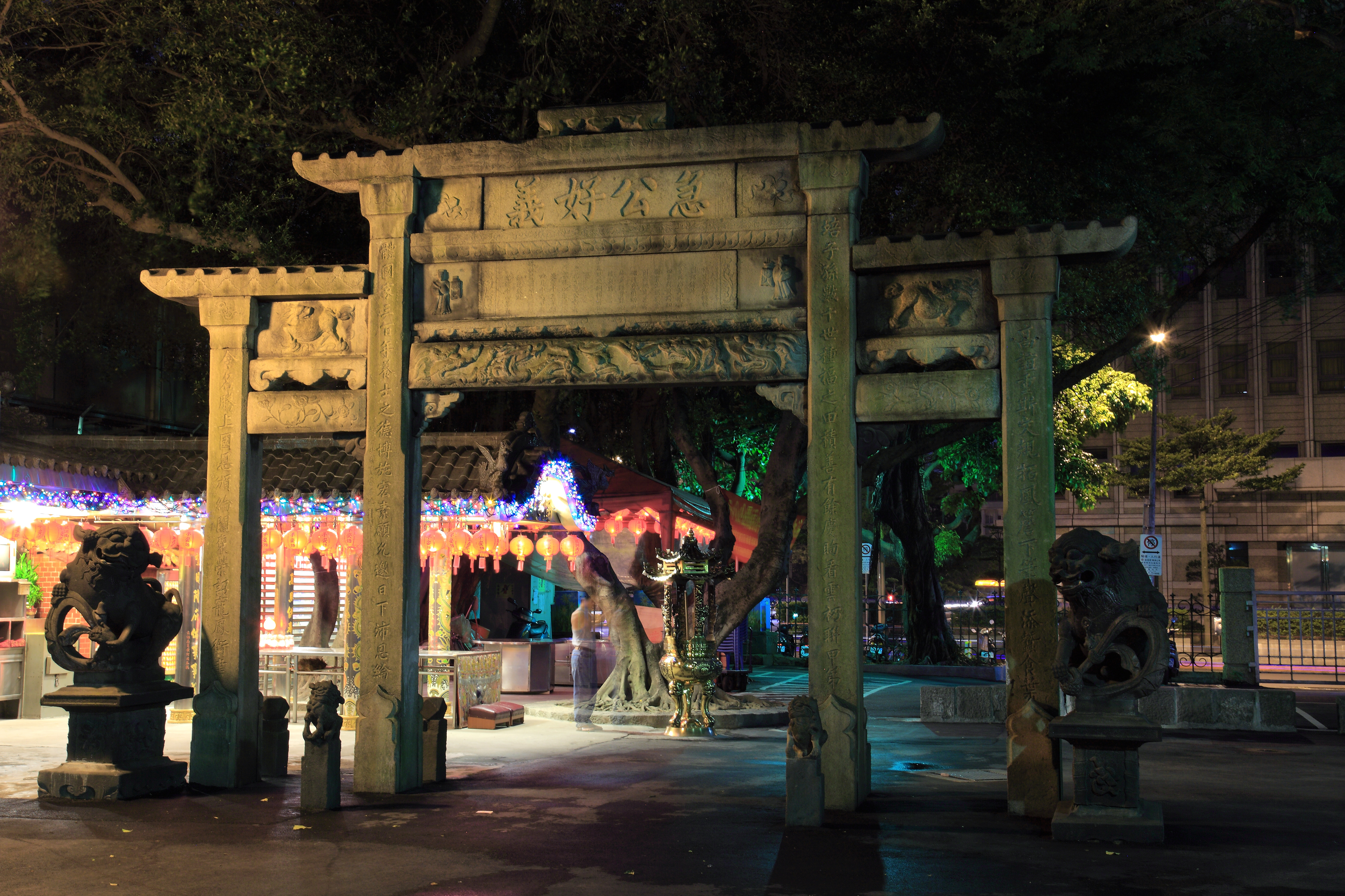 中文（台灣）: 急公好義坊夜景。